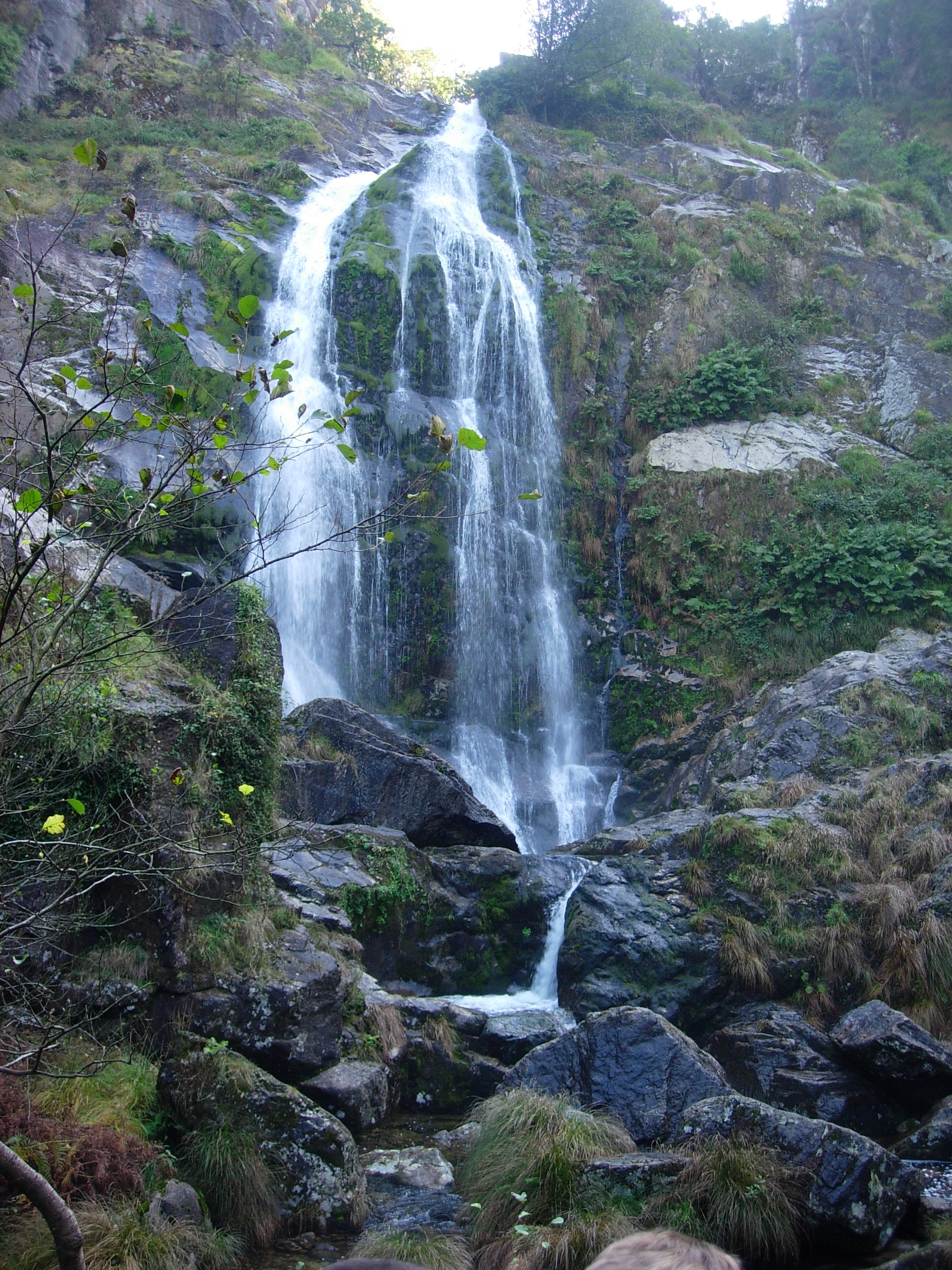 A Fervenza, Río Belelle, Neda, Galiza